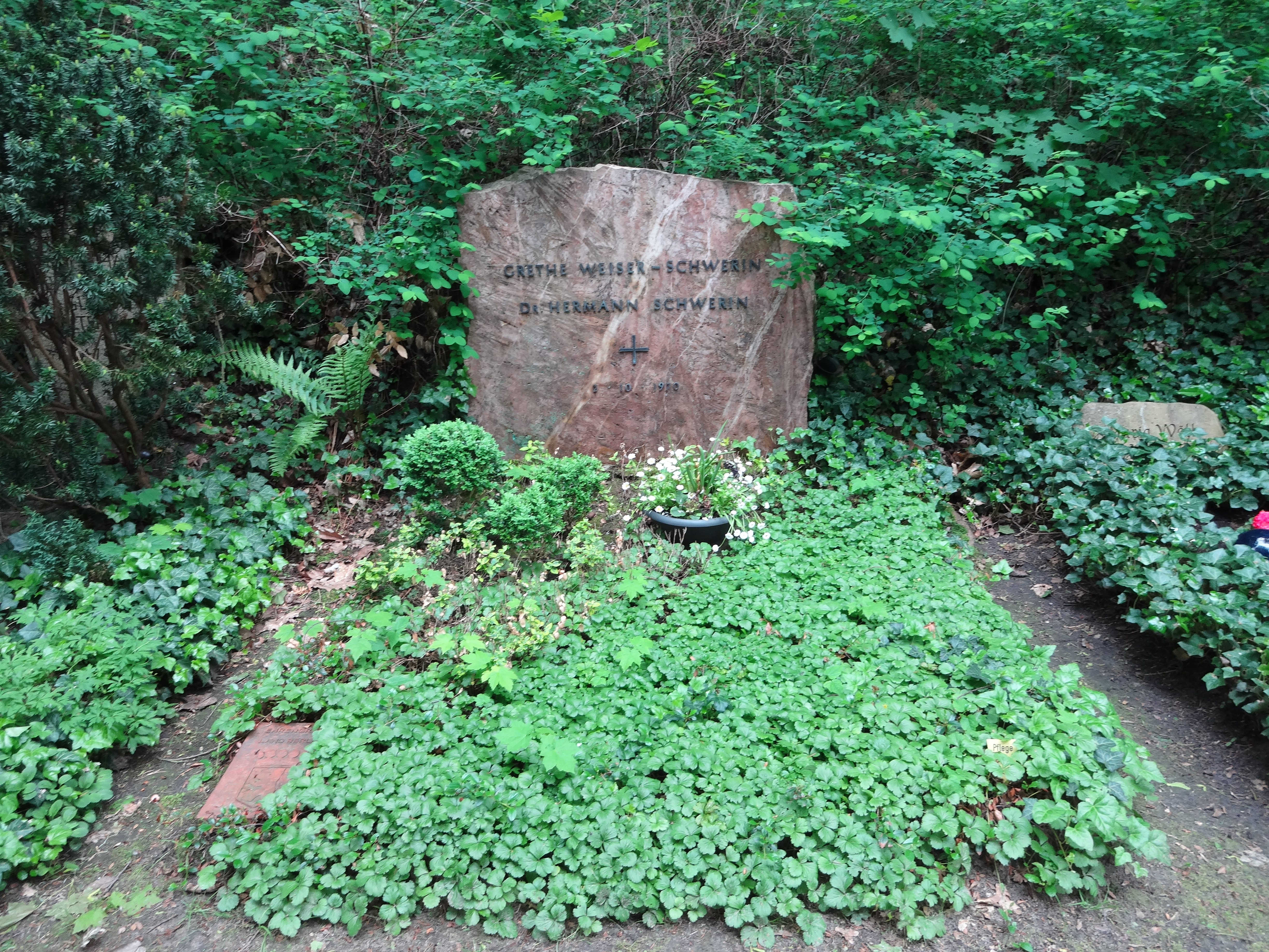 Grab von Grethe Weiser und ihrem Ehemann Hermann Schwerin auf dem Friedhof Heerstraße in Berlin